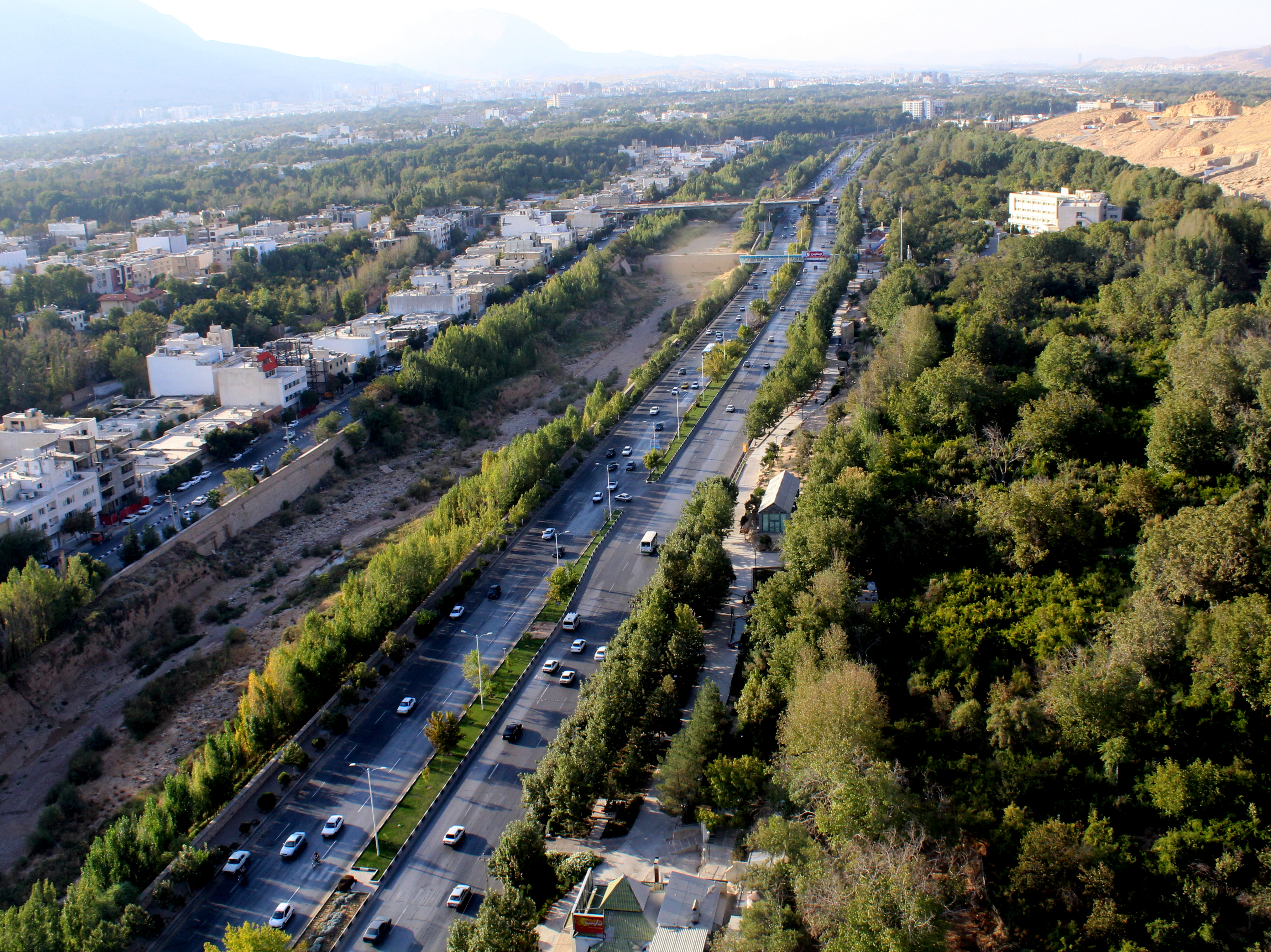 بر فراض هتل بزرگ چمران